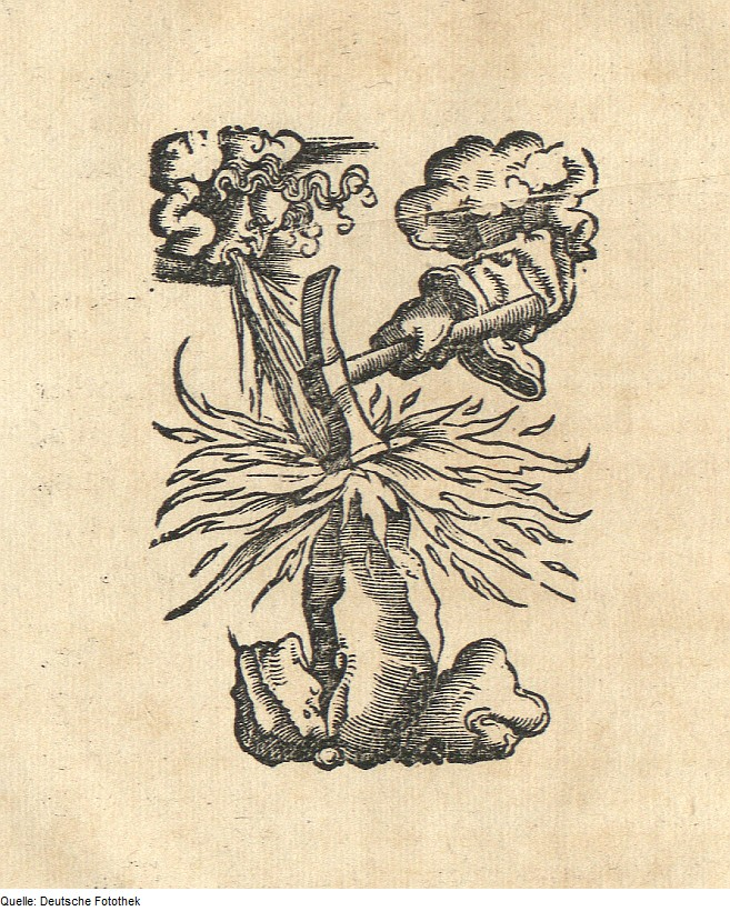 Original image description from the Deutsche Fotothek Druckermarke